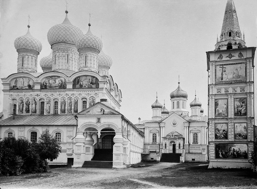 Троицкий собор Ипатьевского монастыря в начале XX века